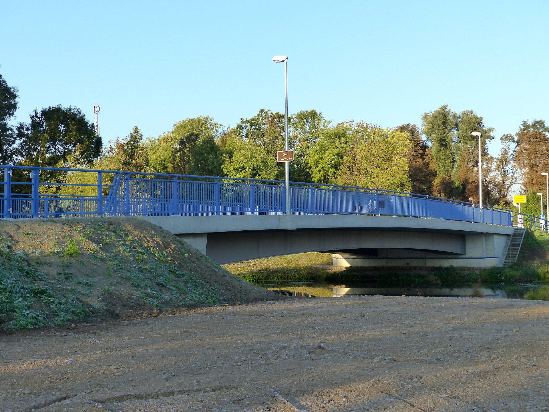 Brückenneubau Oktober 2015, Ansicht von Norden.